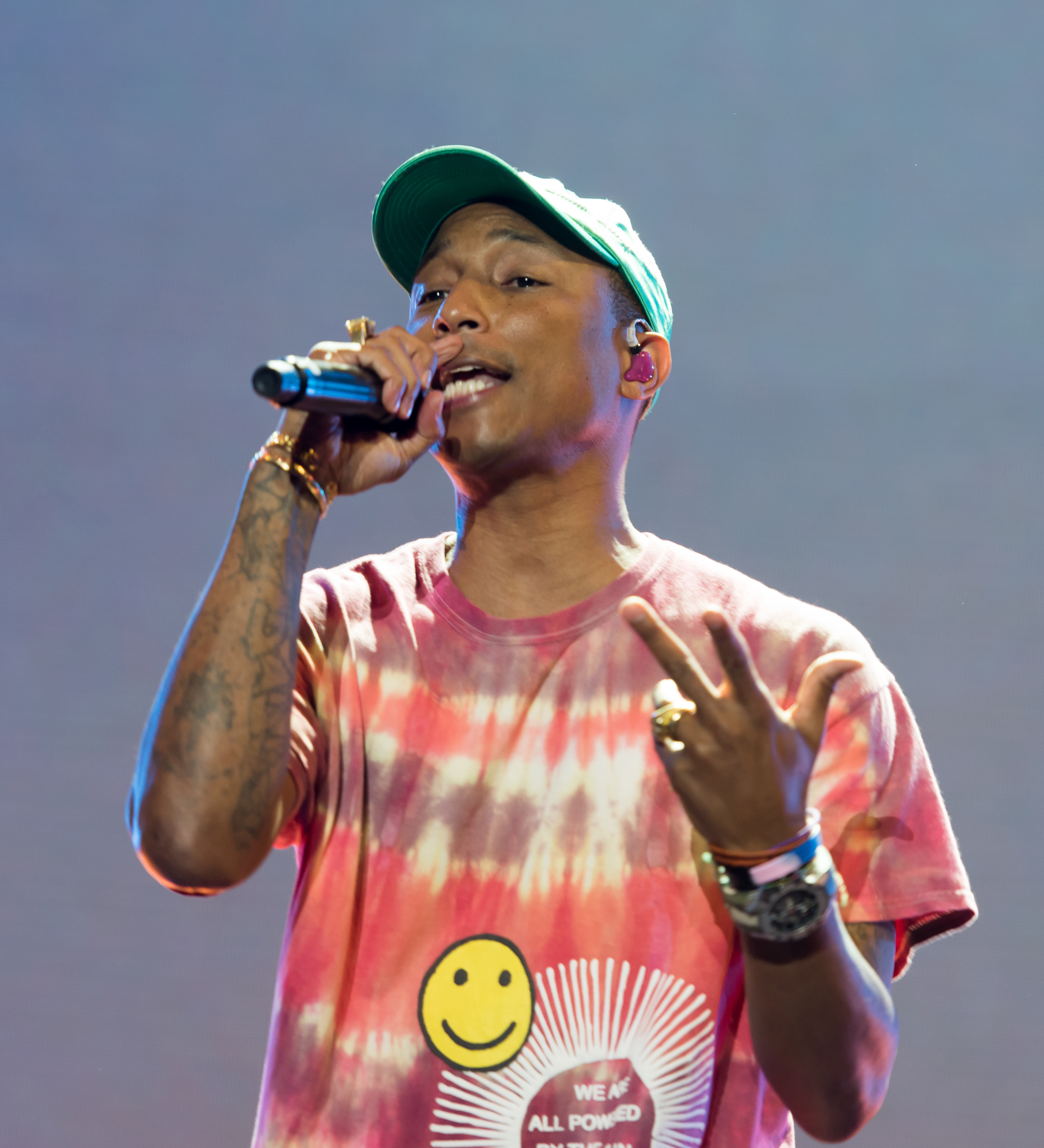 Pharrell Williams beim Global Citizen Festival in Hamburg